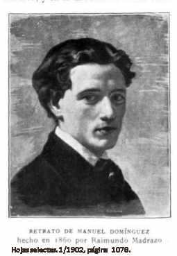 Retrato del pintor Manuel Dominguez pintado en el 1860 por Raimundo Madrazo